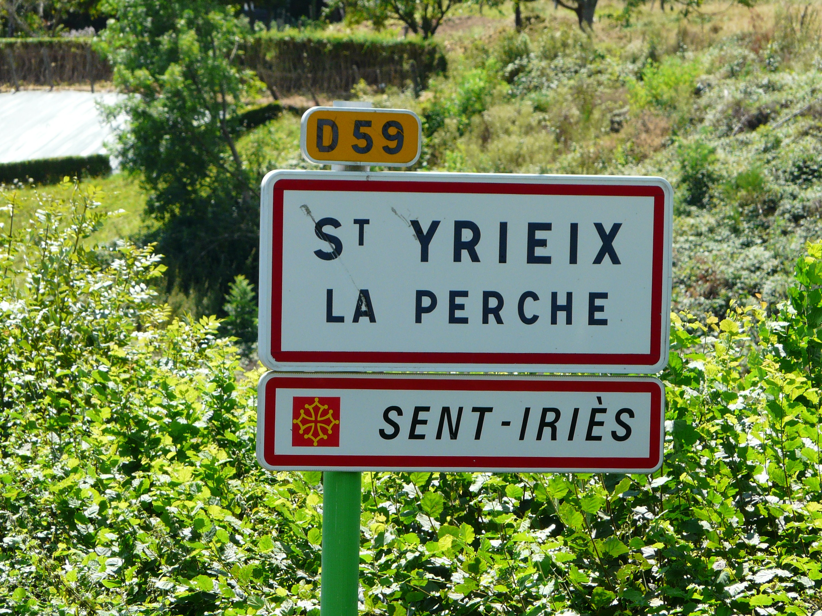 Panneau routier en français et occitan, Saint-Yrieix-la-Perche, Haute-Vienne, France.